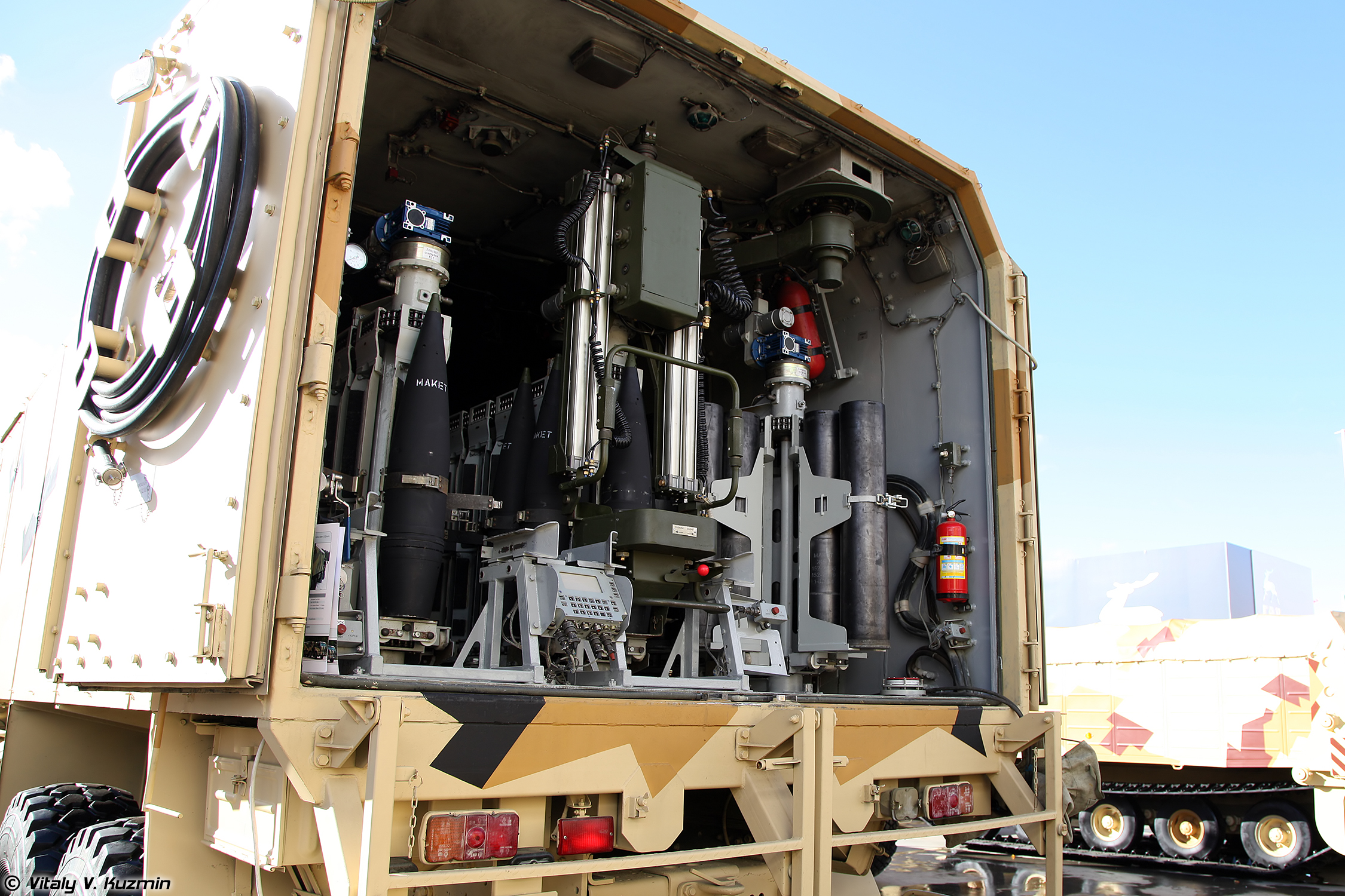 Транспортно-загрузочная машина 2Ф66-1 (2Ph66-1 transport-loading vehicle for 152mm self-propelled artillery)